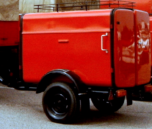 Schlauchtransportanhänger am Löschfahrzeug Robur LO 2002A.